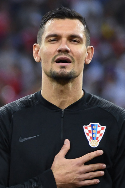 Сборная России заканчивает ЧМ-2018 с поднятой головой. Хорватия выходит в полуфинал